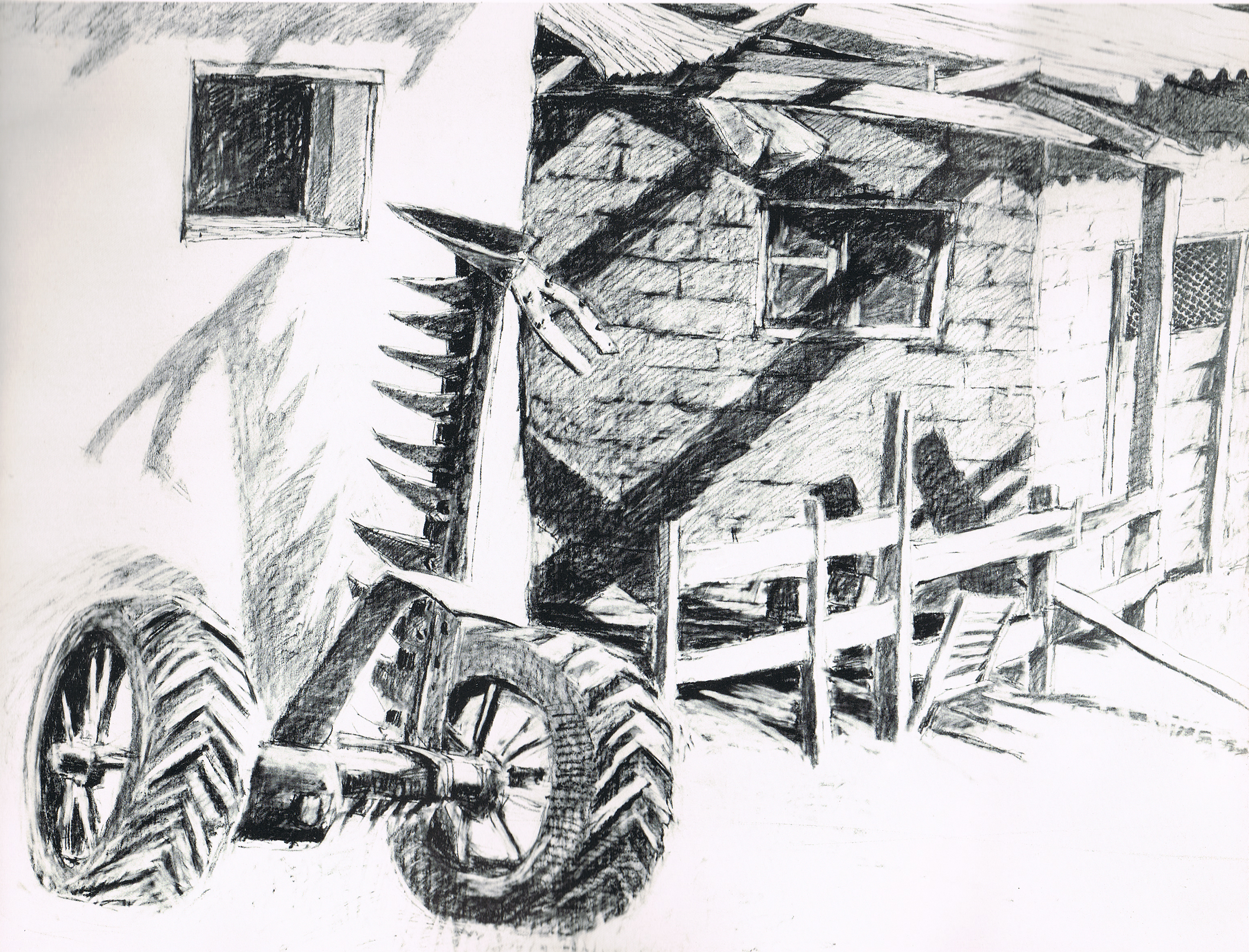 רישום חצר משק בזיכרון יעקב View of a Farm Courtyard in Zikhron Ya'acov